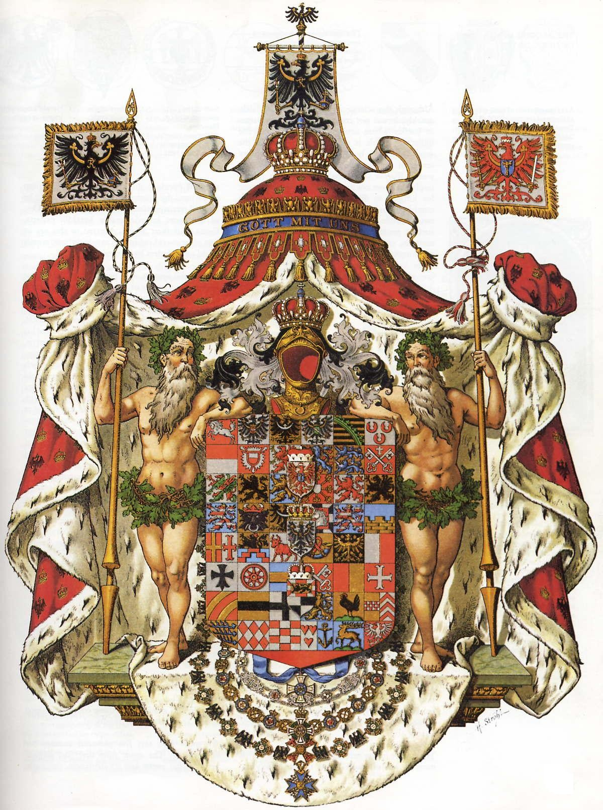 Herb wielki królów Prus (wg. H.G.Ströhl, Deutsche Wappenrolle, 1897)